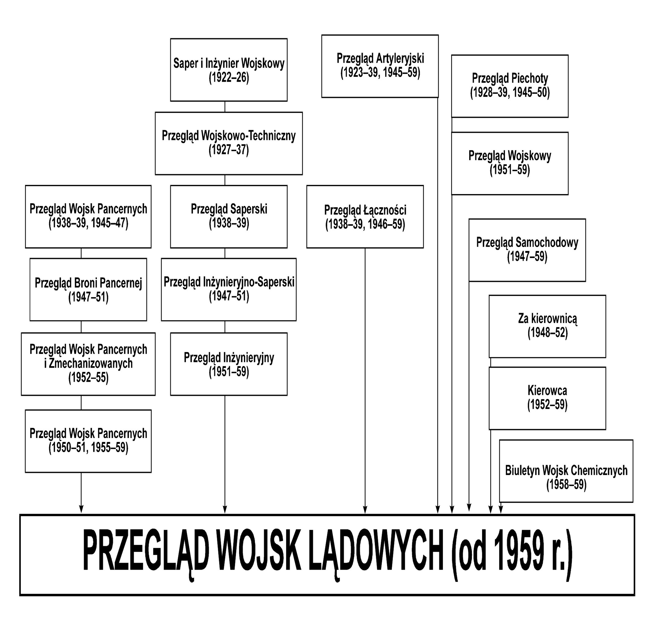 Schemat czasopism Wojsk Lądowych